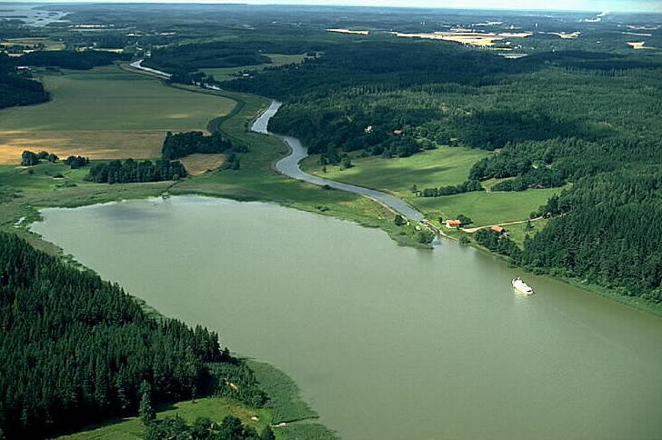 Göta kanal, Hulta sluss i bildens högra del. Motiv: Hulta Nyckelord: Flygbilder, Riksintressen Kategori: KanalanläggningGöta kanal, Hulta sluss i bildens högra del.